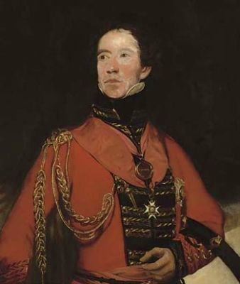 Sir William Lumley (1769-1850), lieutenant-général de l'armée britannique. Il se distingue particulièrement lors de la guerre de la péninsule Ibérique de 1810 à 1811.